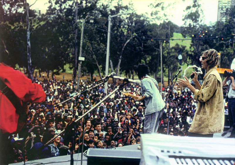 Группа Цветы Концерт в Мозамбике